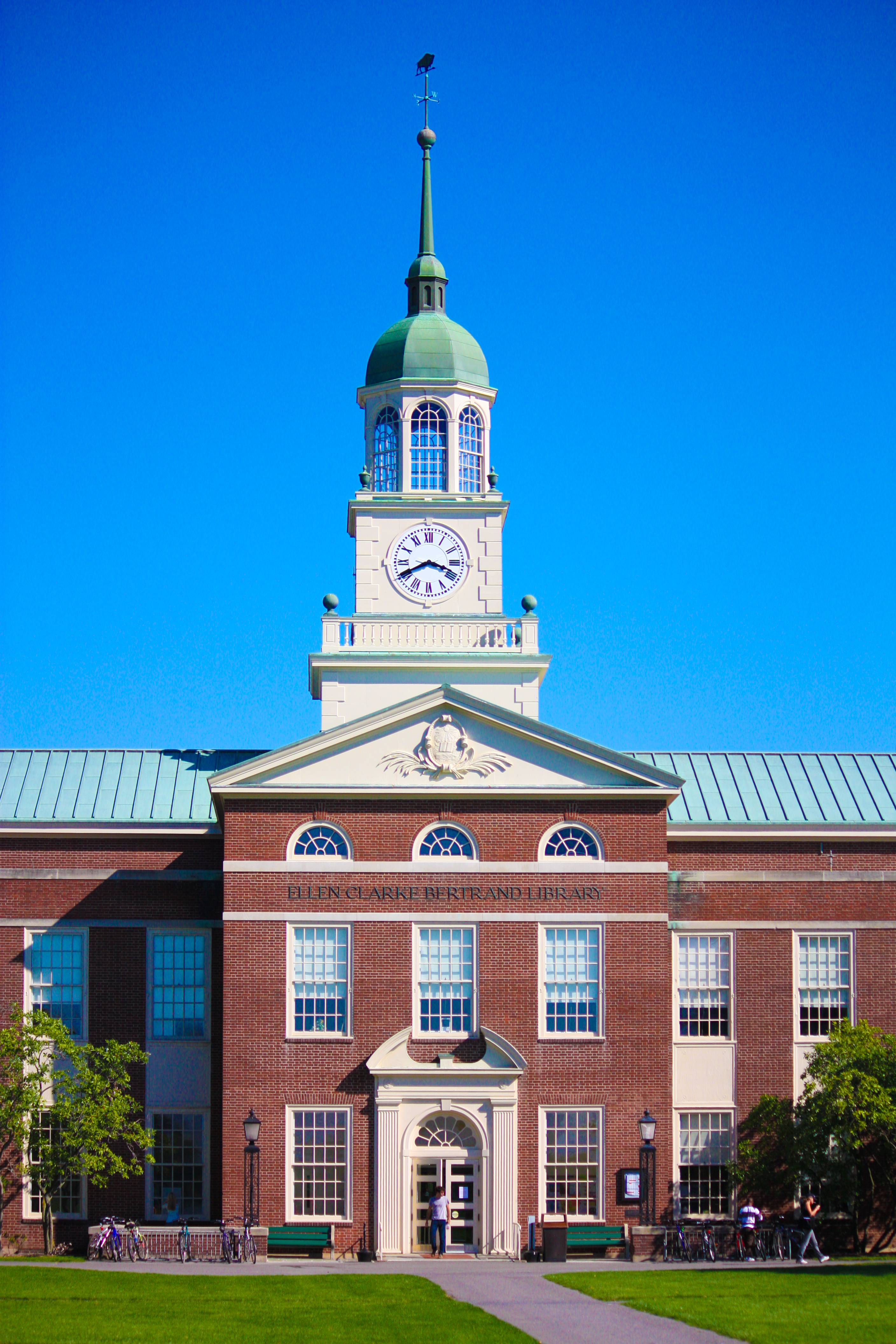 Bucknell's Library